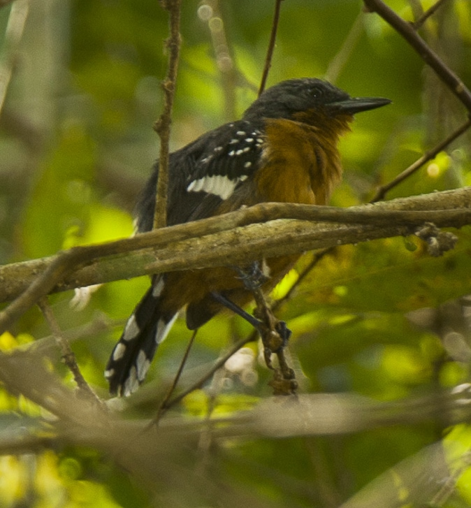 Dot-winged Antwren - Panama_H8O2830